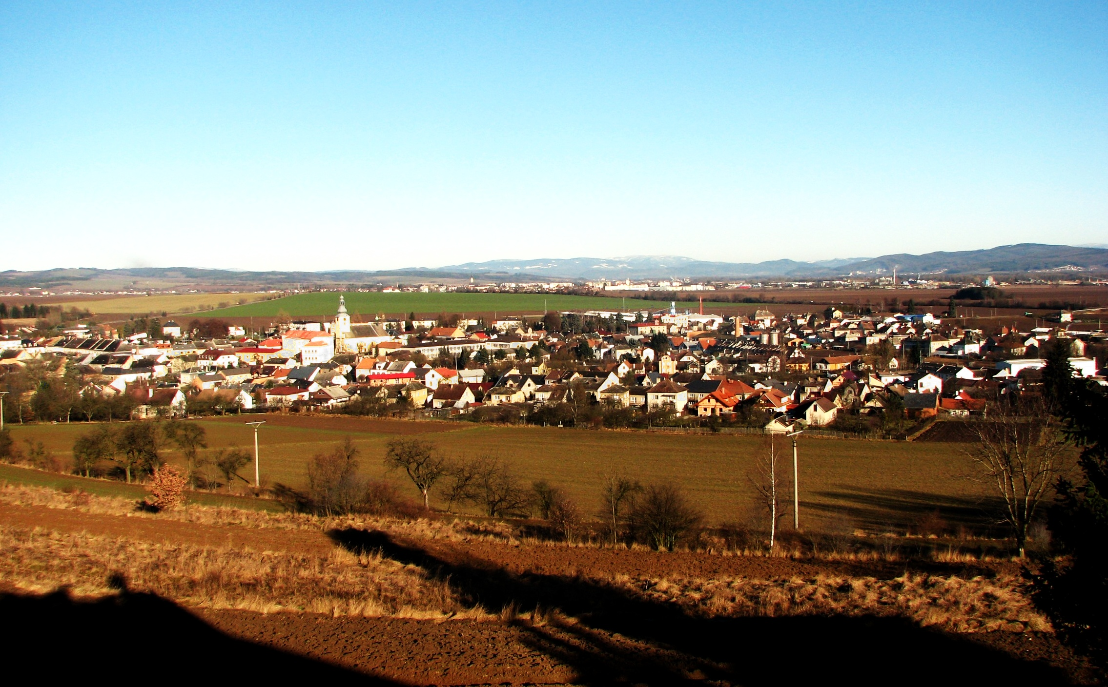 Loštice a okolí